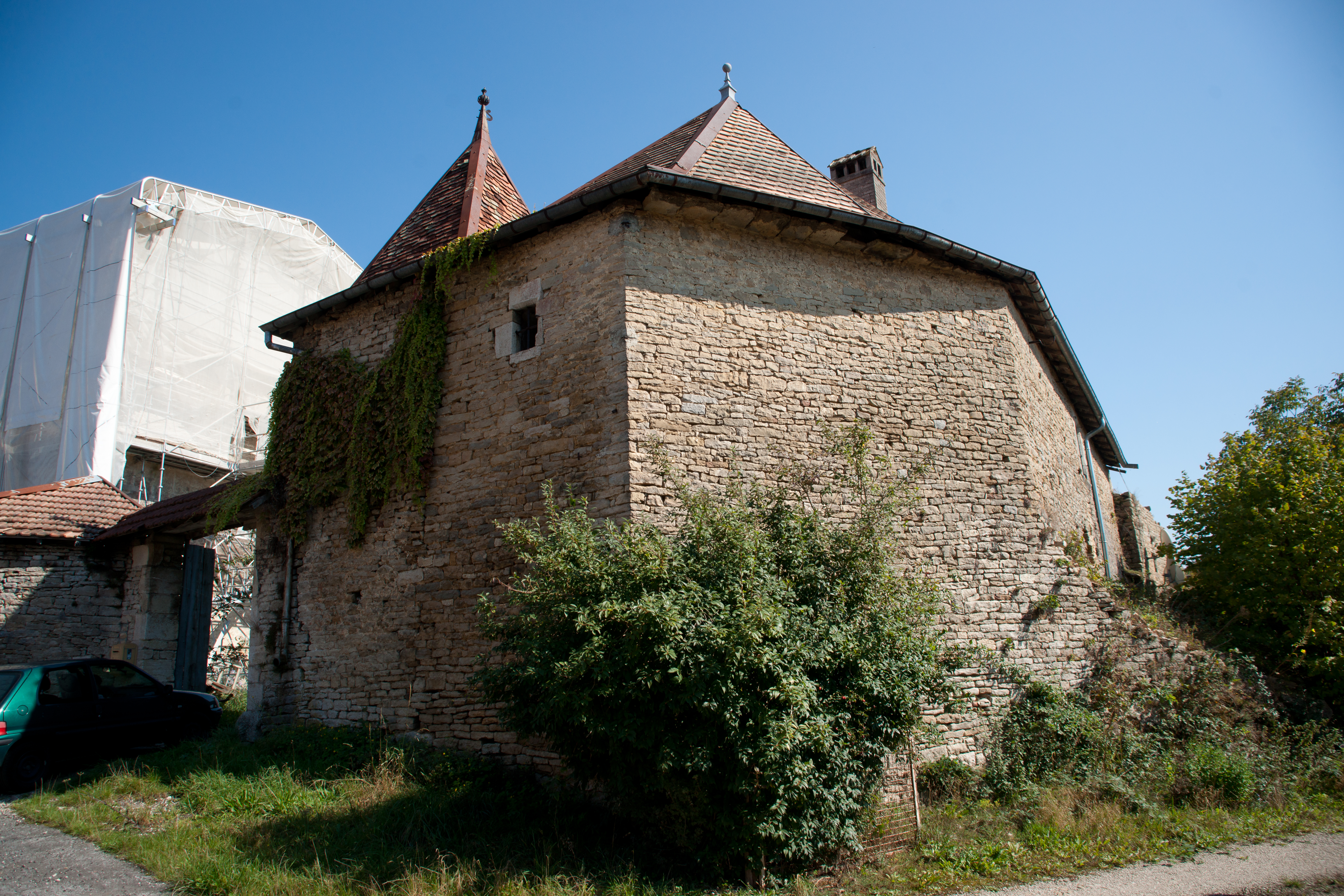 Château de Bartherans, en travaux en 2011. .